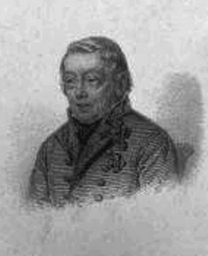 Philipp von Cobenzl (1741-1810) austrian politician.